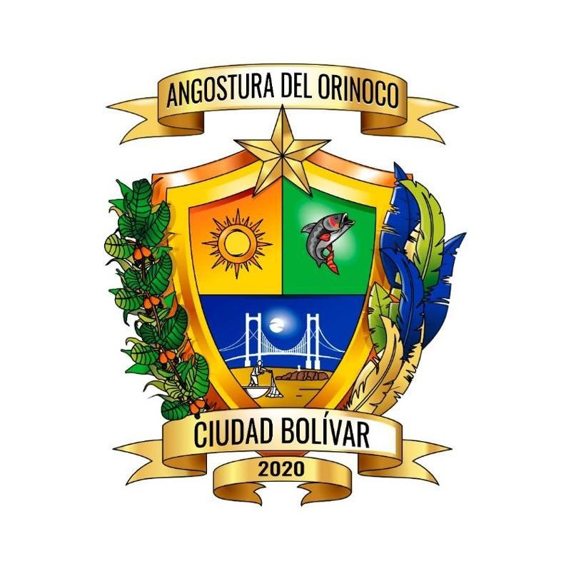 Escudo Municipio Angostura del Orinoco